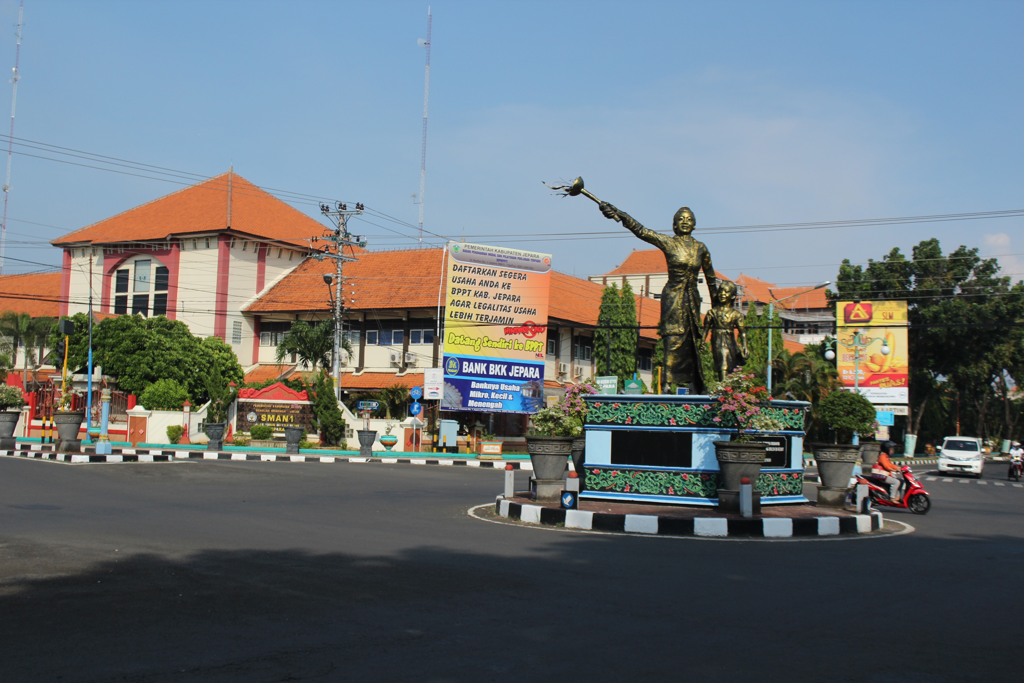 Tugu Kartini yang berbentuk Patung R.A Kartini dengan tangan kanan memegang obor menjulang tinggi dan tangan kiri menggandeng seorang gadis dengan ditangan kiri gadis itu memegang sebuah buku. Memberikan makna bahwa beliau adalah salah satu pahlawan yang mengangkat strata wanita khususnya kalangan jelata yang pada jaman feodalisme notabene hanya berkutat dengan masalah dapur. Menuju terang benderang dengan terpenuhinya hak para wanita untuk dapat mengenyam bangku pendidikan formal.